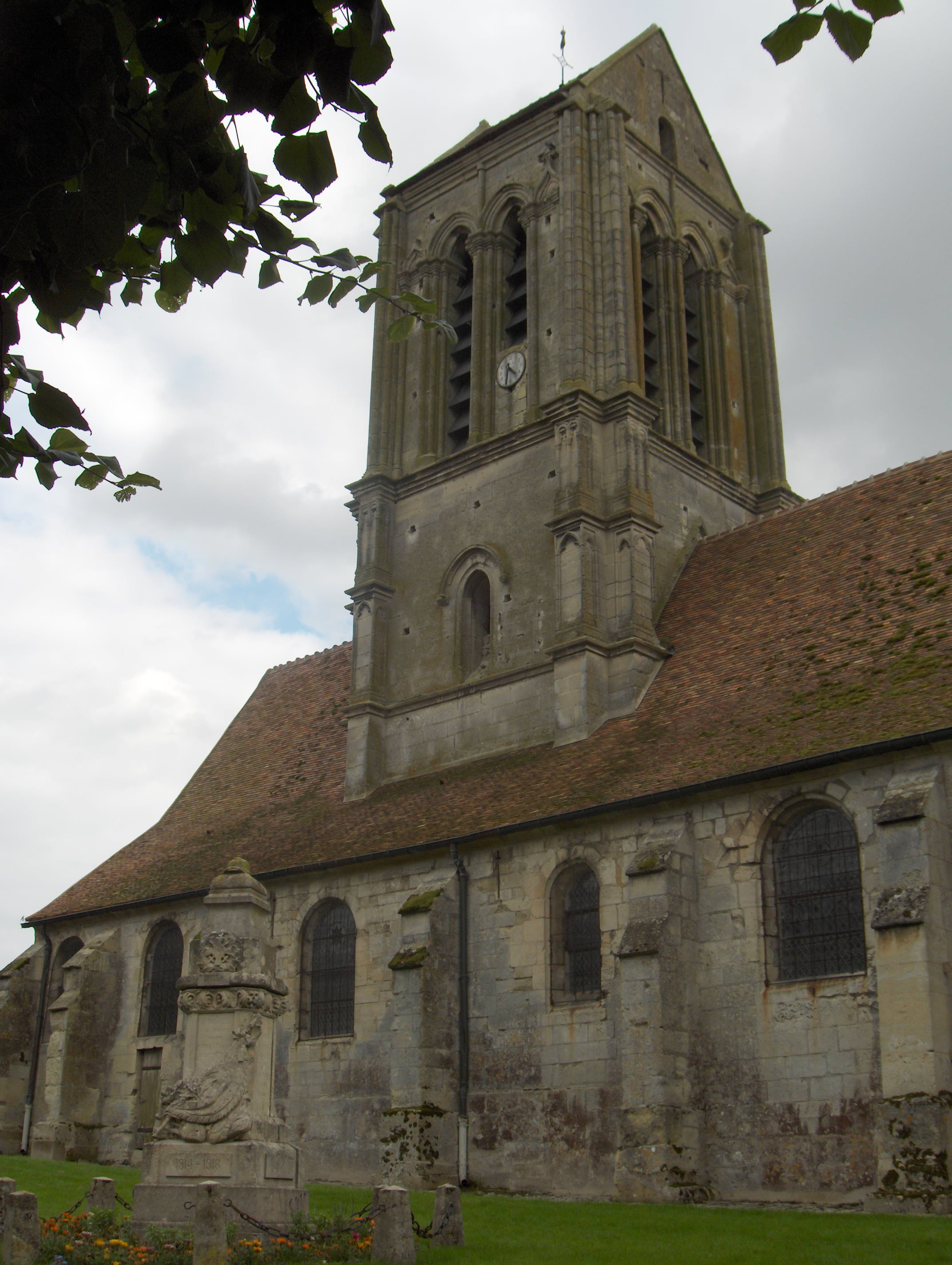 Eglise Saint-Clair à Hérouville (Vexin français, Val-d'Oise)